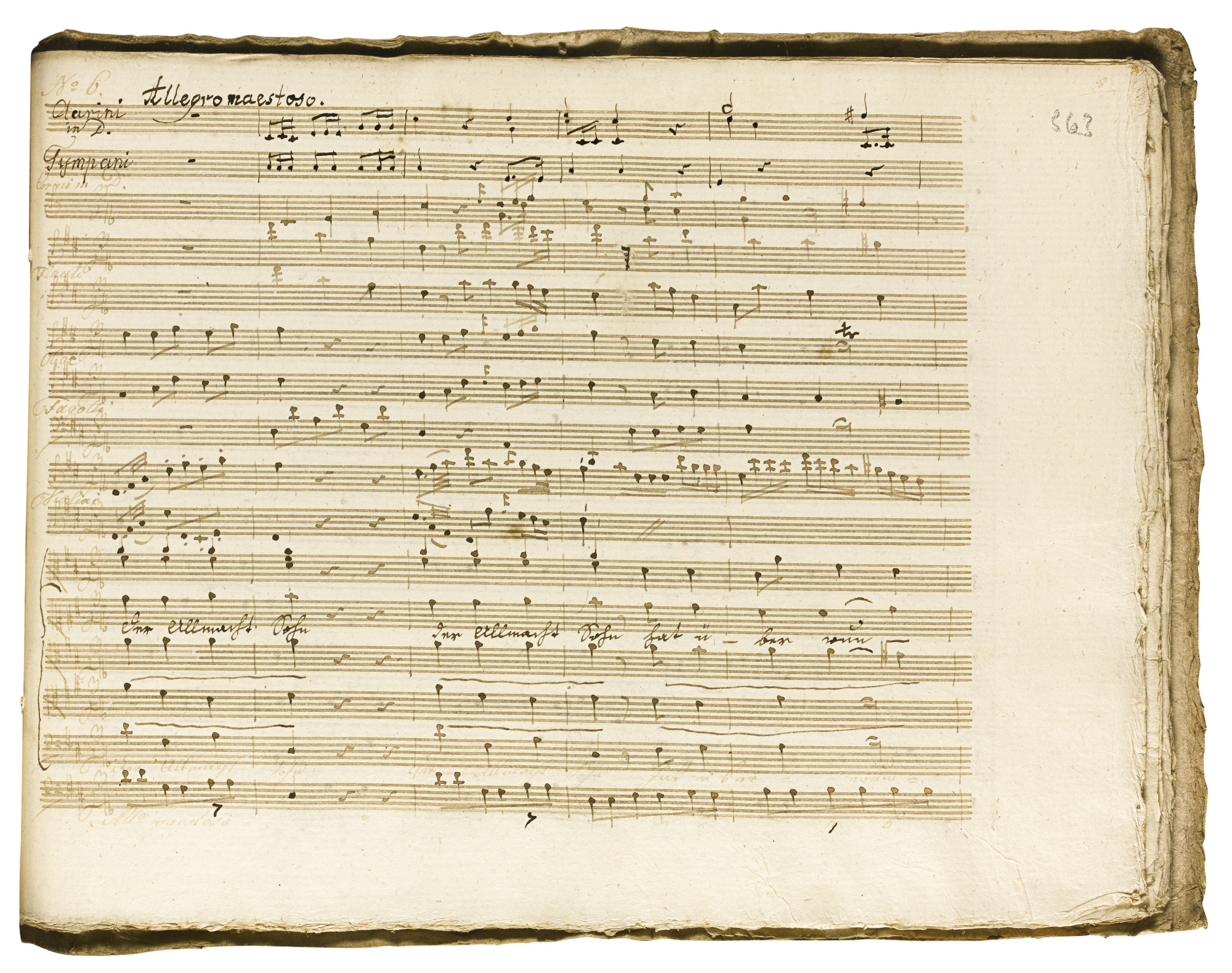 Johann Georg Albrechtsberger: Die Pilgrime auf Golgatha (1781), Abschrift des 18. Jahrhunderts, S. 363, Schlusschor: Der Allmacht Sohn hat überwunden. Sotheby's, Music, Continental Books & Manuscripts, 5. Juni 2013, Lot 373